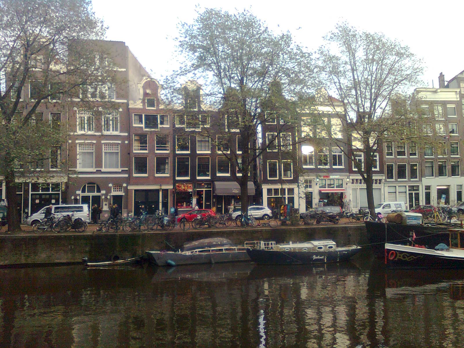 Фото